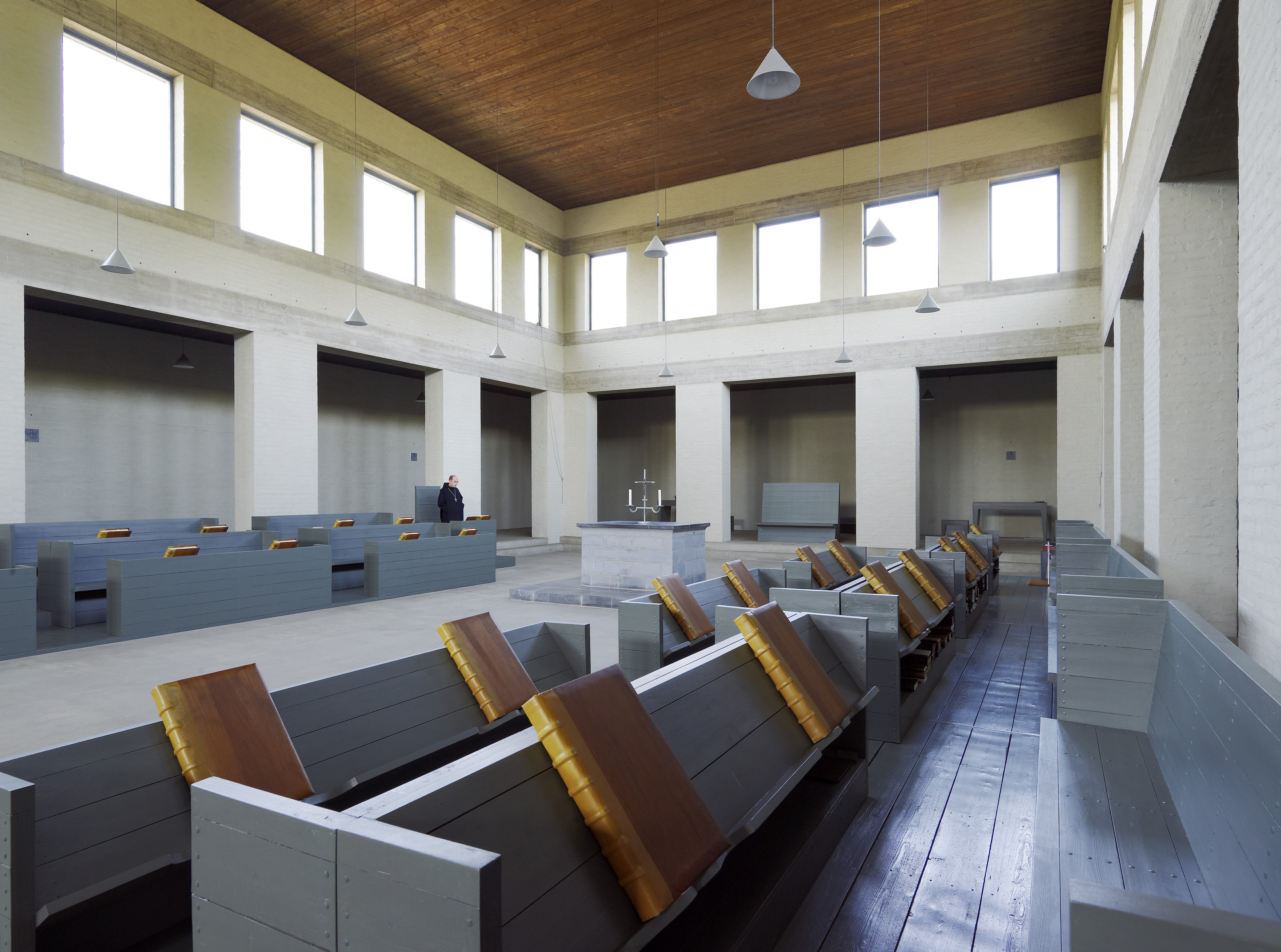 Sint Benedictusberg: Interieur bovenkerk, zicht op de middenbeuk met koorbanken voor de monniken